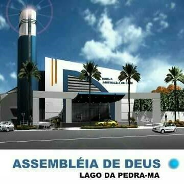 assim ficará o mega templo da Assembleia de Deus em Lago da Pedra